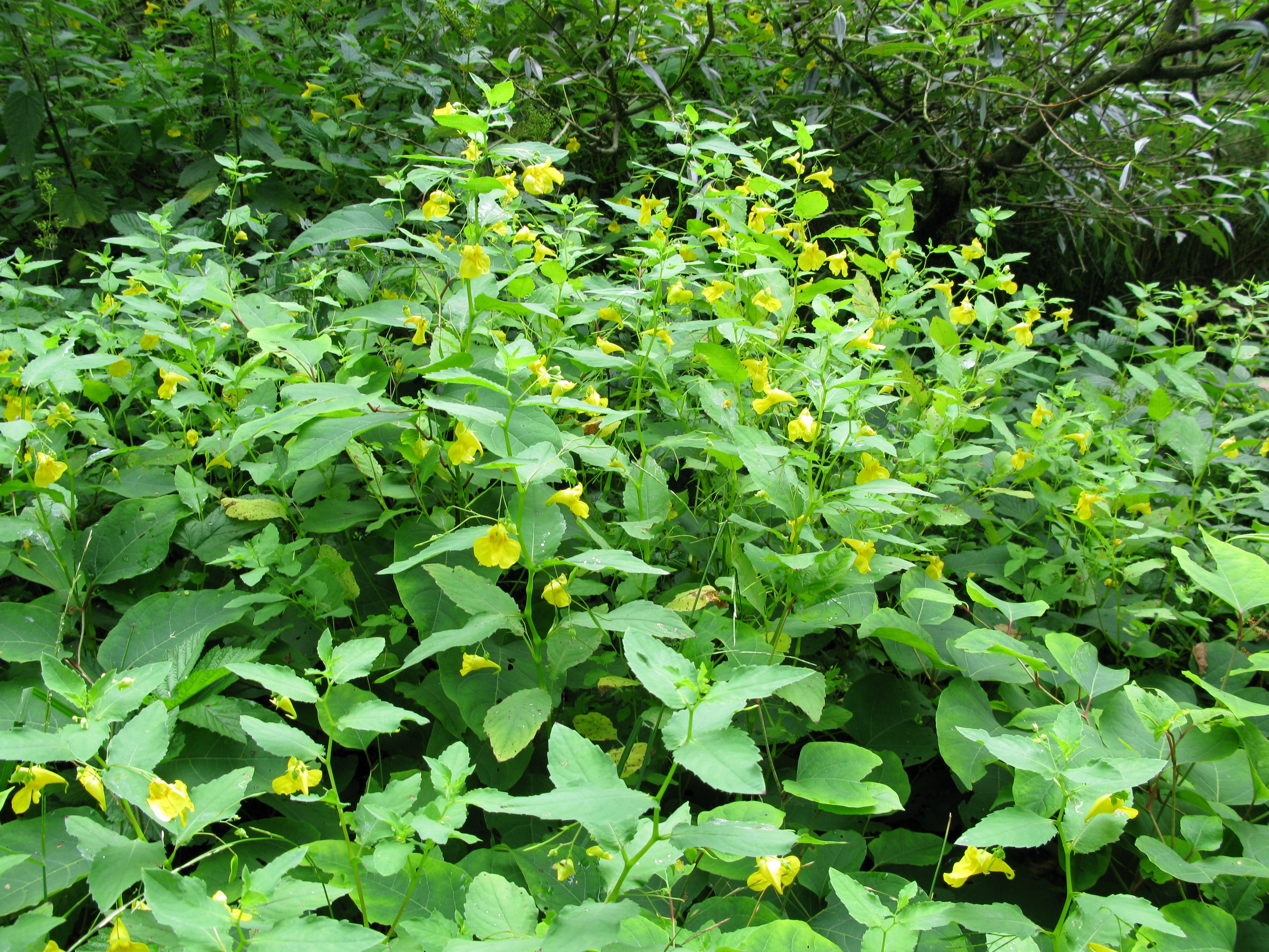 Großes Springkraut